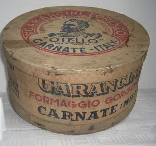 anni '40